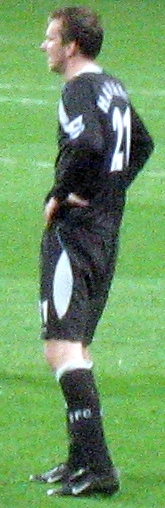 Dietmar Hamann